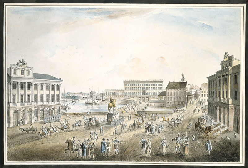 Norrmalmstorg (nuv. Gustav Adolfs torg) och Kungl. Slottet med Gamla Norrbro (riven 1797). Akvarellerad konturetsning på papper av Johan Fredrik Martin (1755-1816), 440x610mm. I den här målningen ser vi hur Gustav Adolfs torg såg ut före 1892. Det är två byggnader med likadana fasader som står vända mot varandra. Vi ser också Gamla Norrbro som förband Norrmalm med Helgeandsholmen. Den övergick i en gata som gick ända till Mynttorget i Gamla stan. Mellan Norrbro och Gamla Norrbro ser vi hovstallet. Det revs för att ge plats åt nuvarande Riksdagshuset. Utgiven av: Stockholms stadsmuseum. Objekt-ID: Inventarienummer SSM 100929.